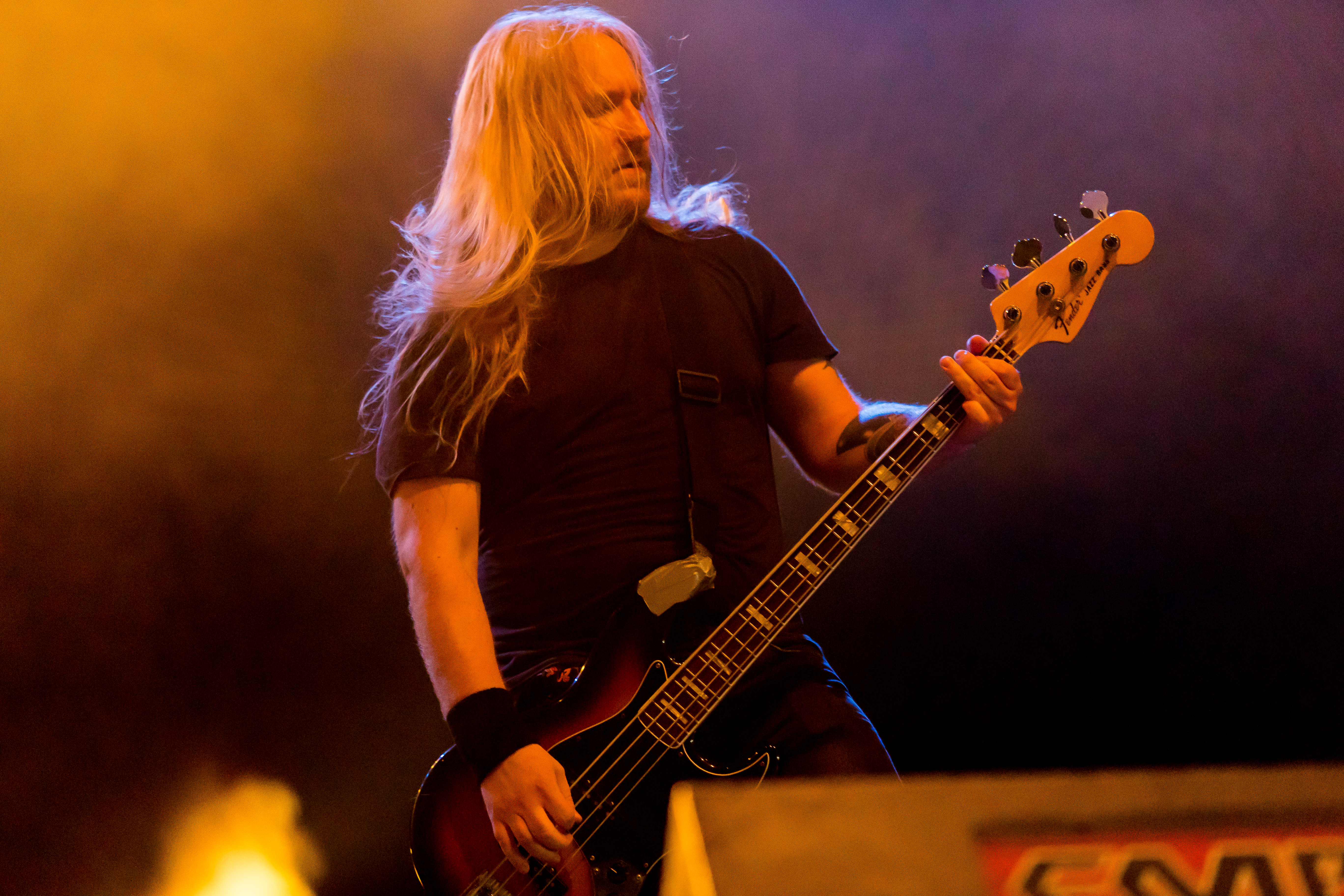 Rotten Sound during Summer Breeze 2016 at , Dinkelsbühl, Bayern, Germany on 2016-08-20, Photo: Sven Mandel